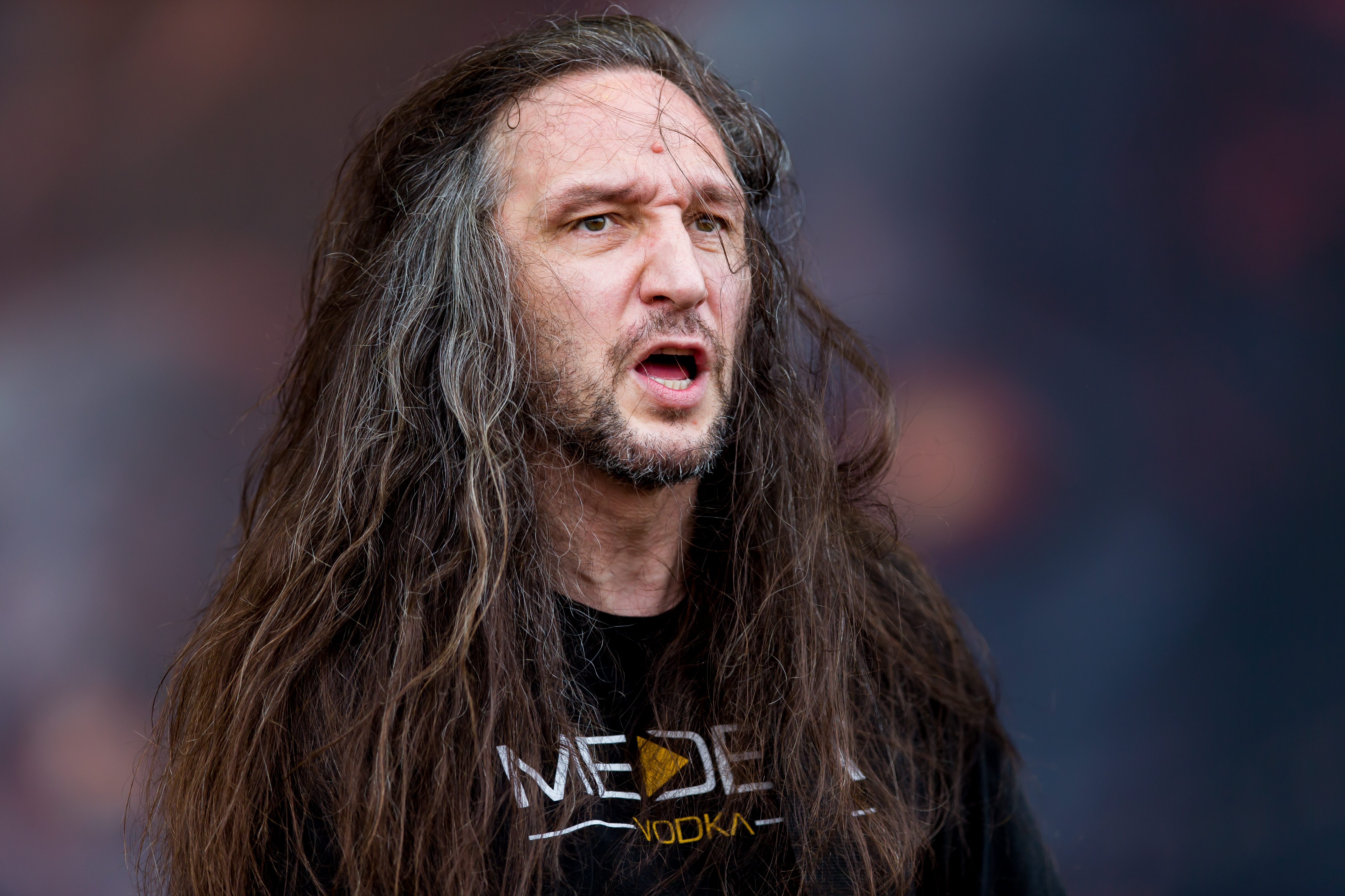 Exodus during Summer Breeze 2016 at , Dinkelsbühl, Bayern, Germany on 2016-08-18, Photo: Sven Mandel